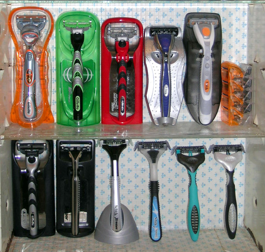 Colección de cuchillas de afeitar - Gillette Fusion Power, Gillette m3power, Mach3Turbo, Schick Quattro Chrome, Schick Quattro Power, Gillette Mach3, Gillette Sensor, Schick Xtreme3 System, Schick Xtreme3 SubZero y recambios de Schick Xtreme3